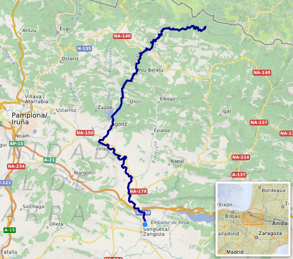 carte réalisée sur umap.